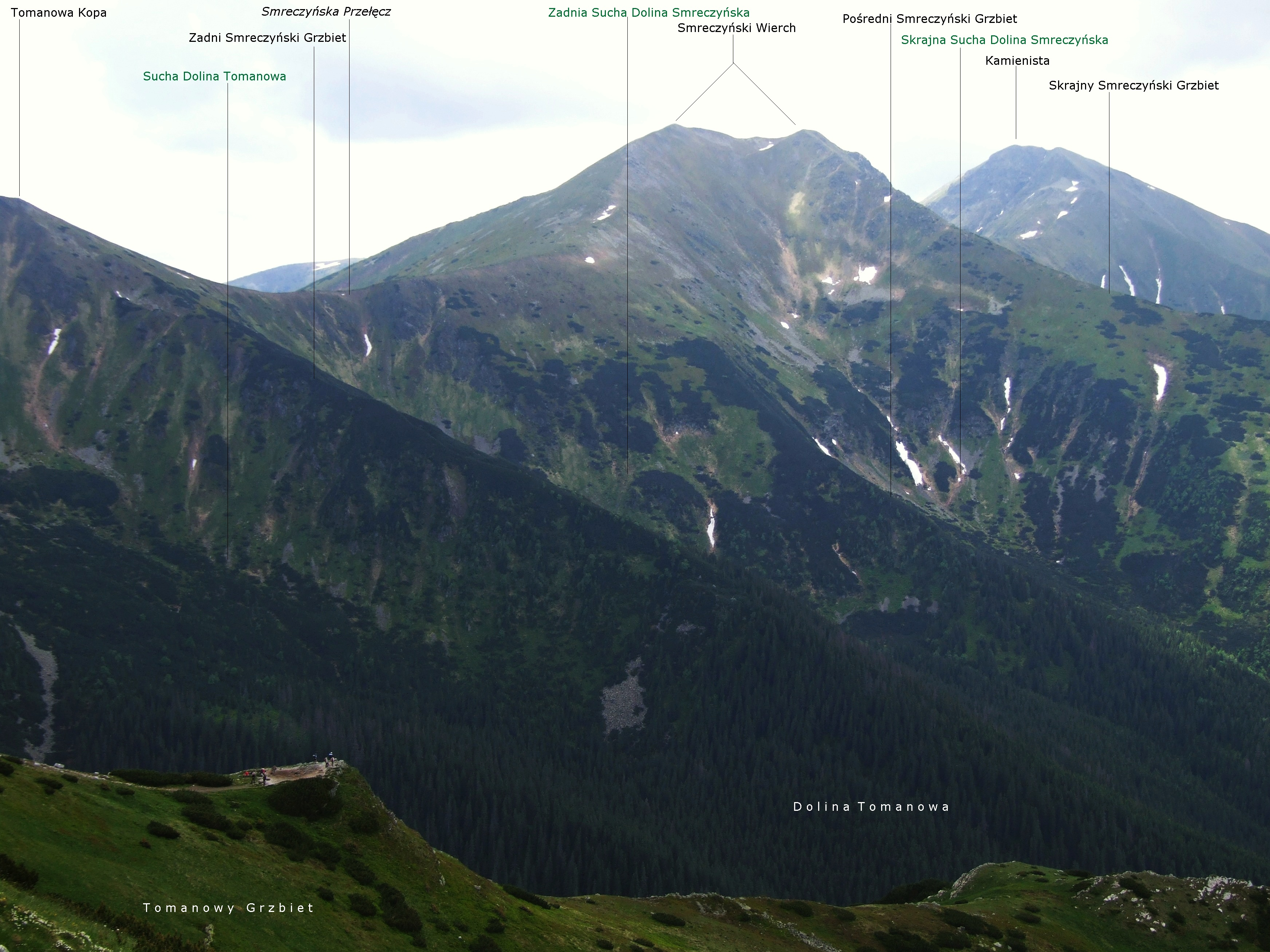 Widok z trasy:Chuda Przełączka-Dolina Tomanowa